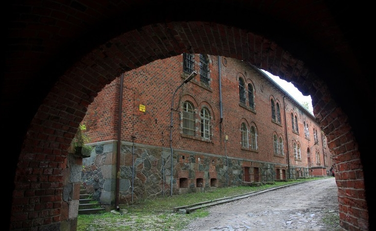 Giżycko, Twierdza Boyen